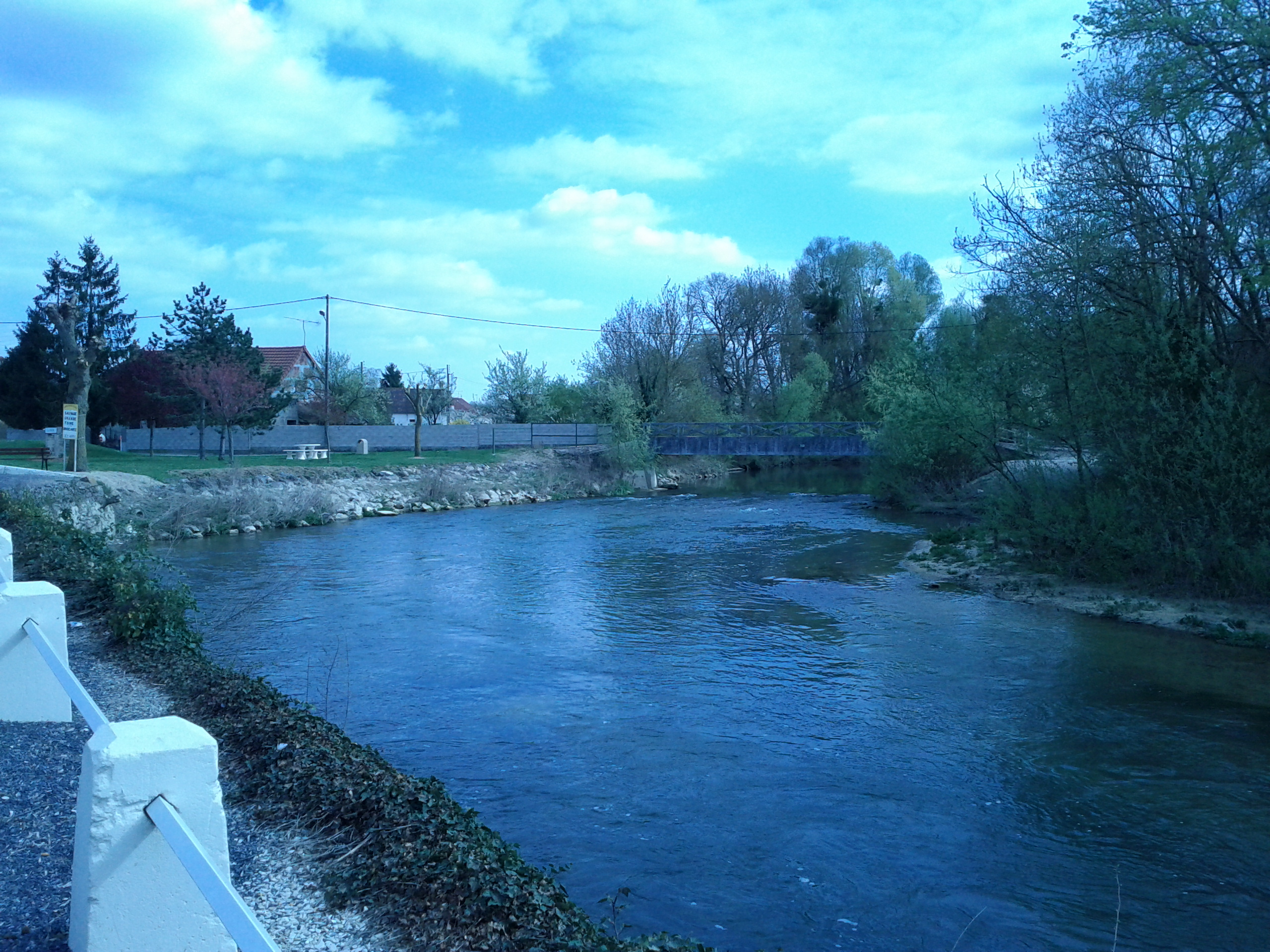 51260 Saint-Just-Sauvage, France